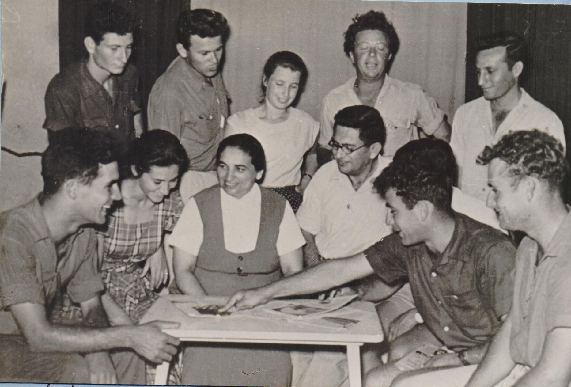 עדה יגורי, אוסף נח ועדה יגורי, ארכיון יגור